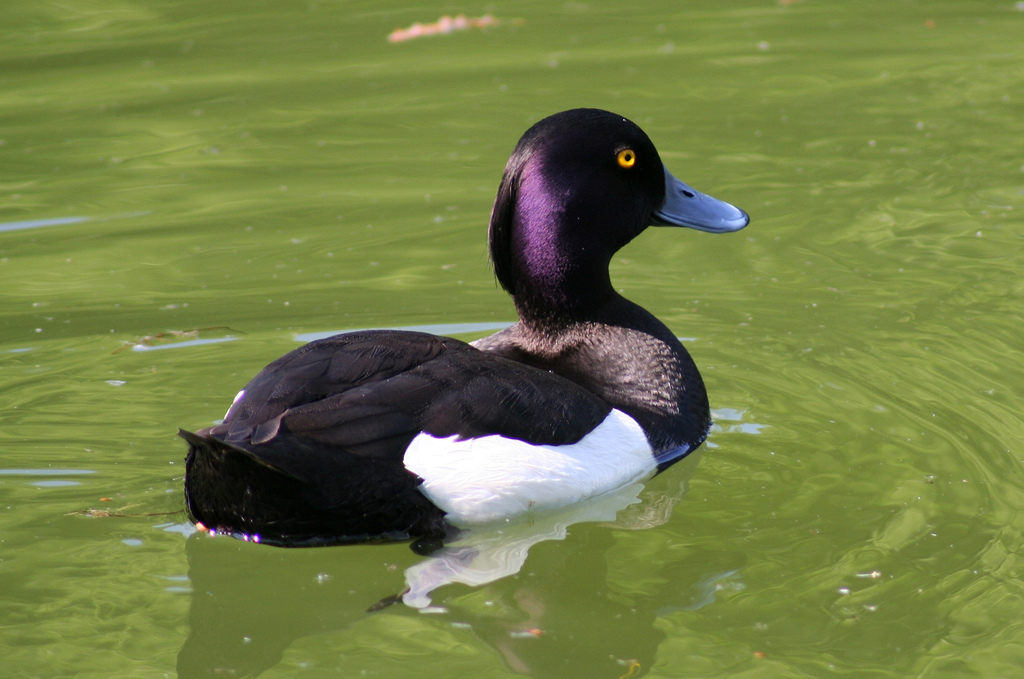 Aythya fuligula male